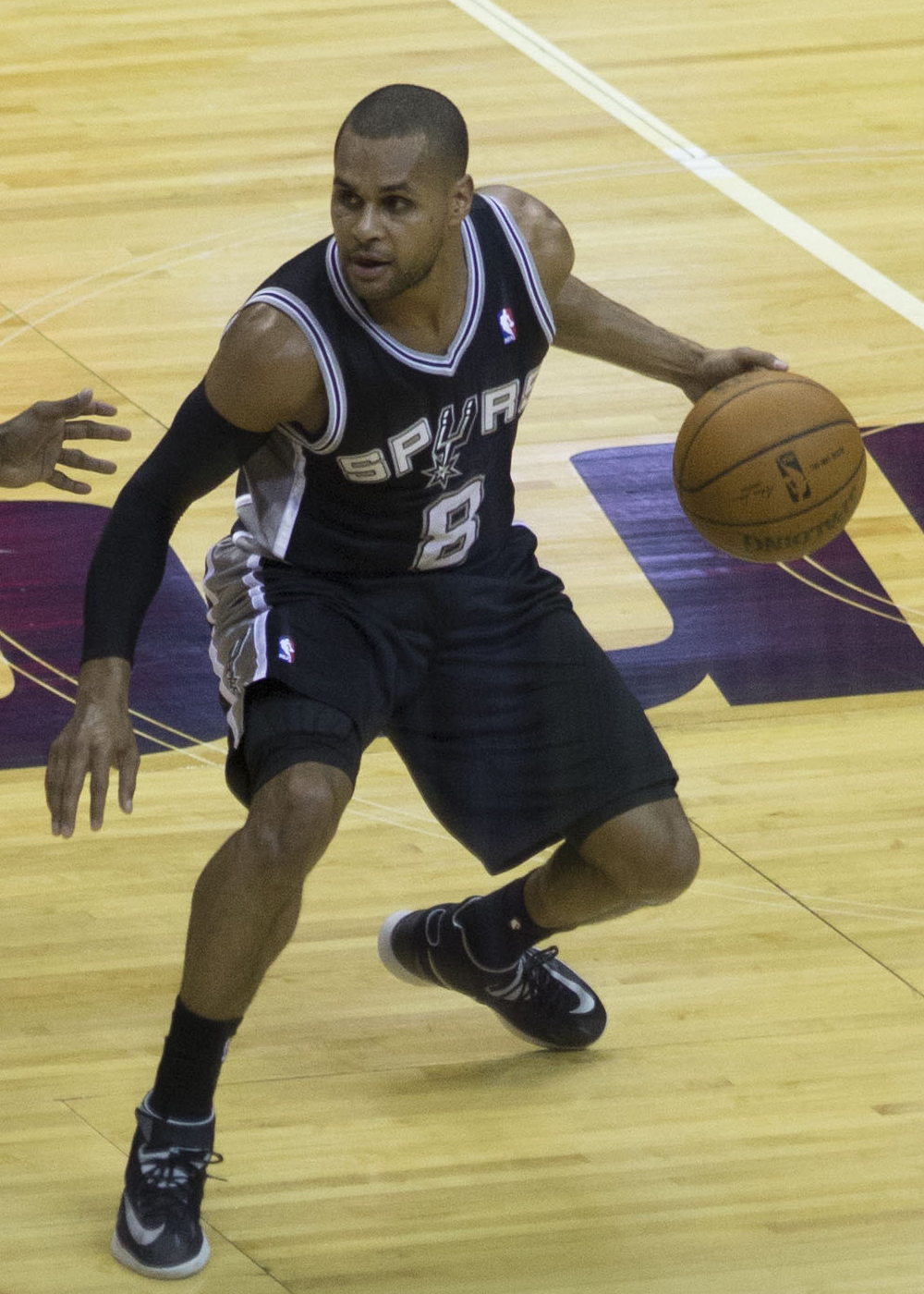 Patric Mills